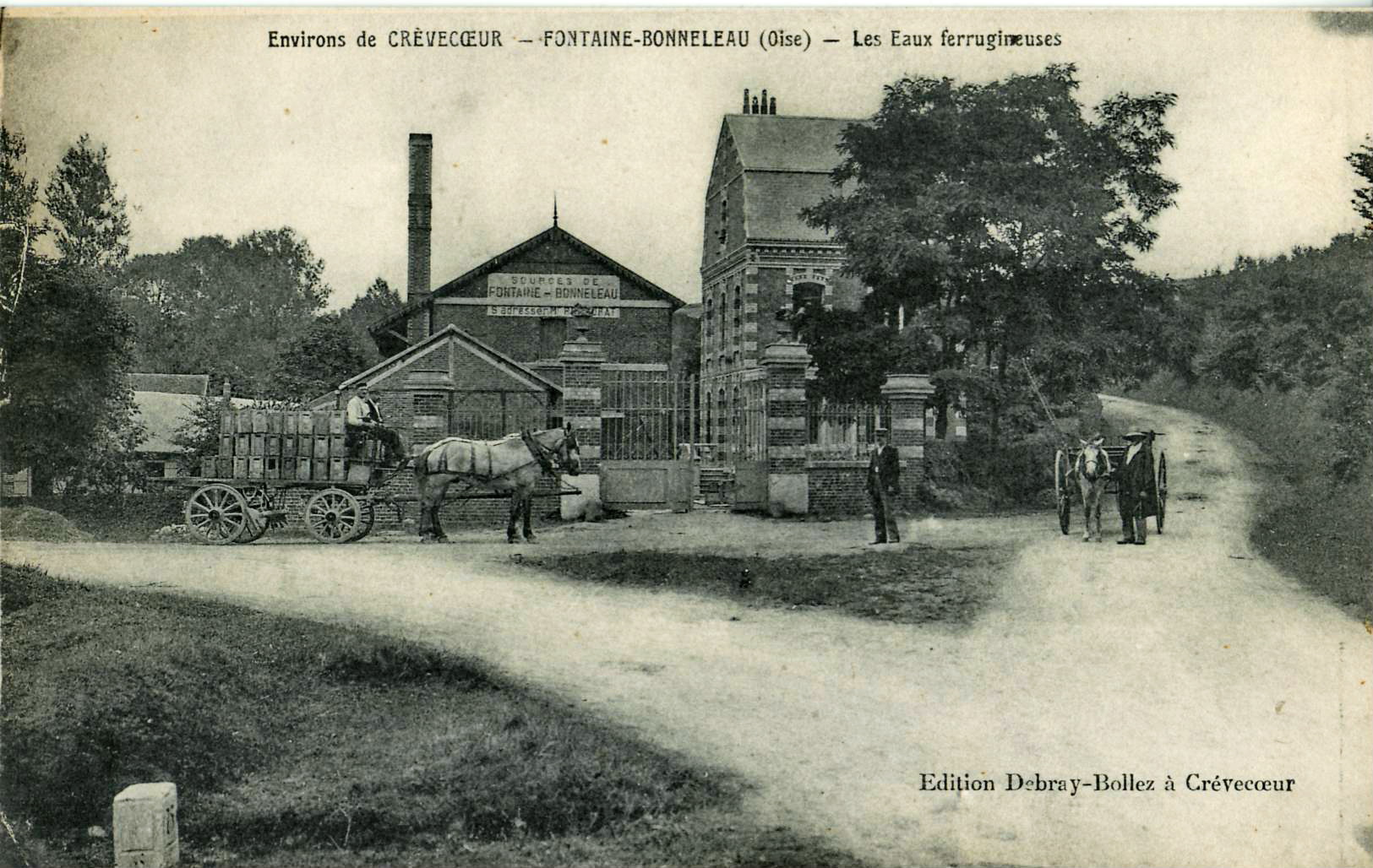 Carte postale ancienne éditée par Debray-Bollez, collection « Environs de Crèvecœur » Fontaine-Bonneleau - Les eaux ferrugineuses